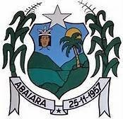 Brasão de Armas de Abaiara